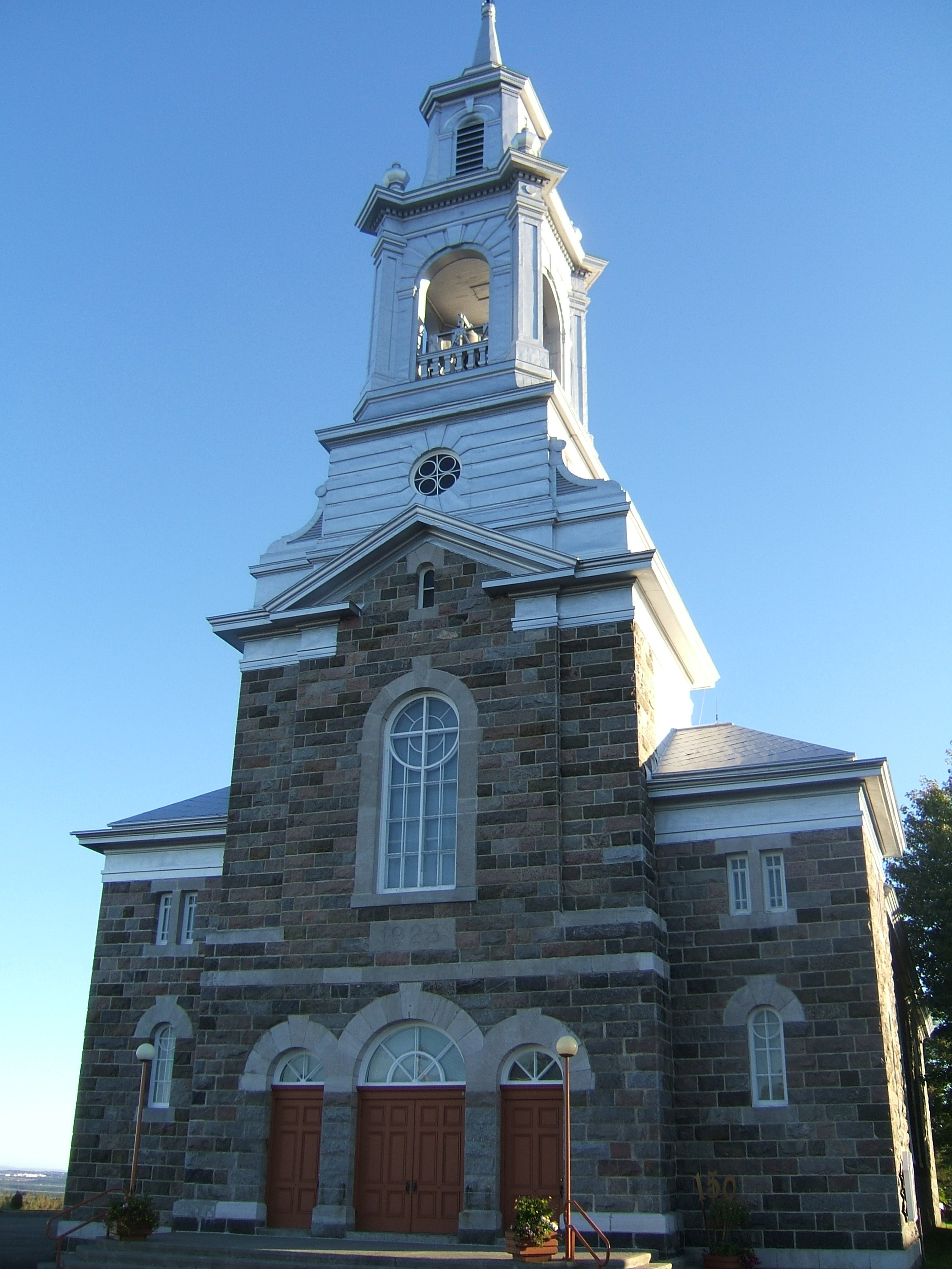 Église de Saint-Antonin (Québec, Canada). Auteur : Nicolas Gagnon, septembre 2006